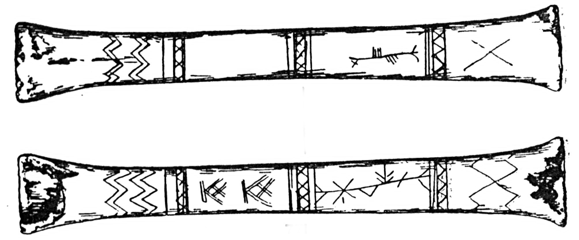 Abzeichnung des Tullycommon-Knochens mit Ogham-Inschrift (CIIC 52). Der Tullycommon-Knochen wurde 1934 bei Ausgrabungen der Befestigungsanlage Cahercommaun, Townland Tullycommon, Grafschaft Clare, Irland, entdeckt. Er wird ins 7. bis 10. Jahrhundert datiert.